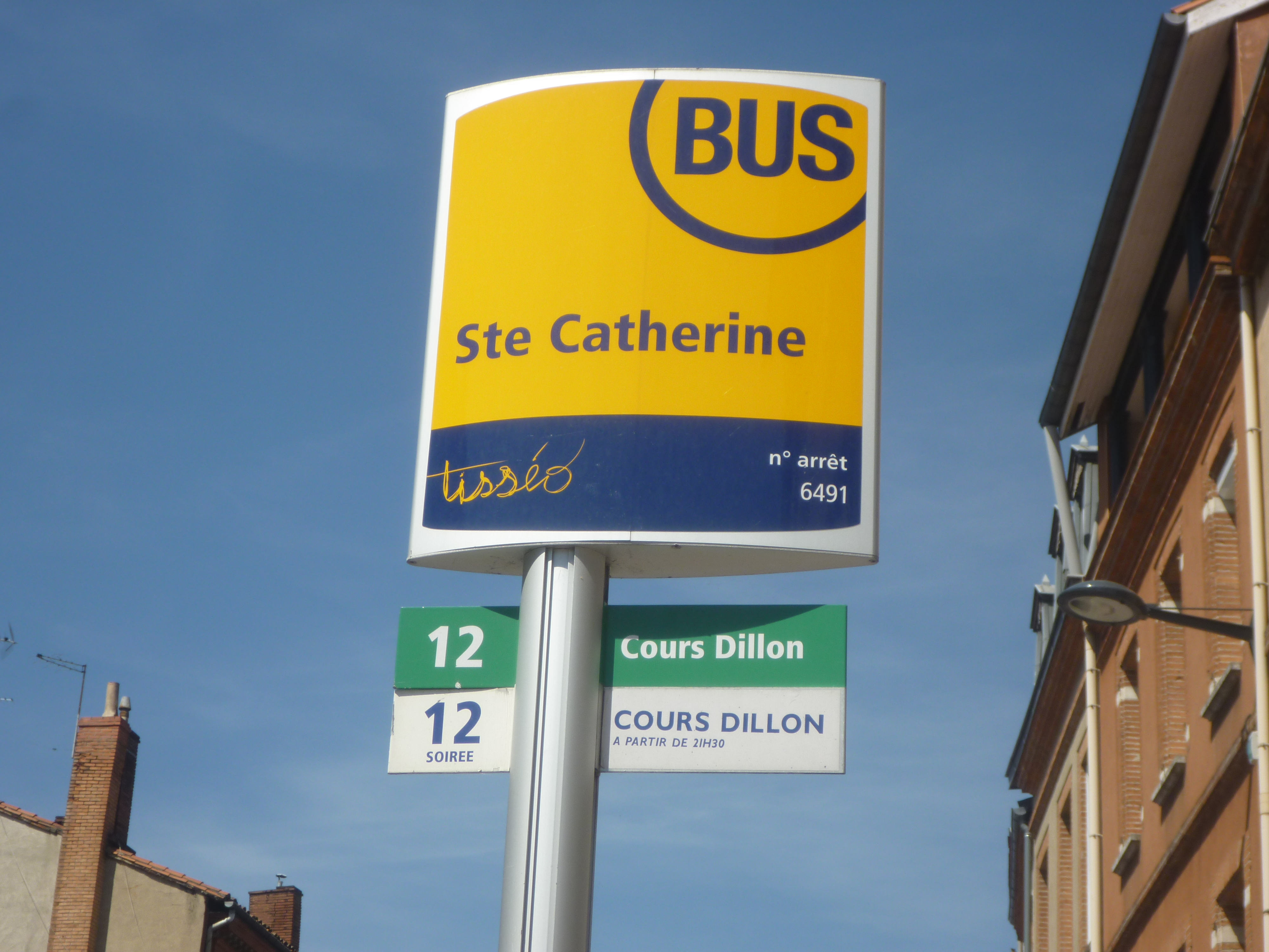 panneau bus tisséo toulouse